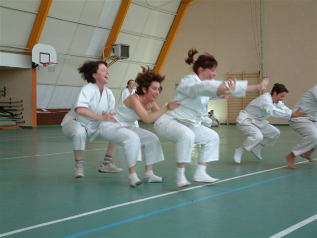 Shintaido France Meiso jump